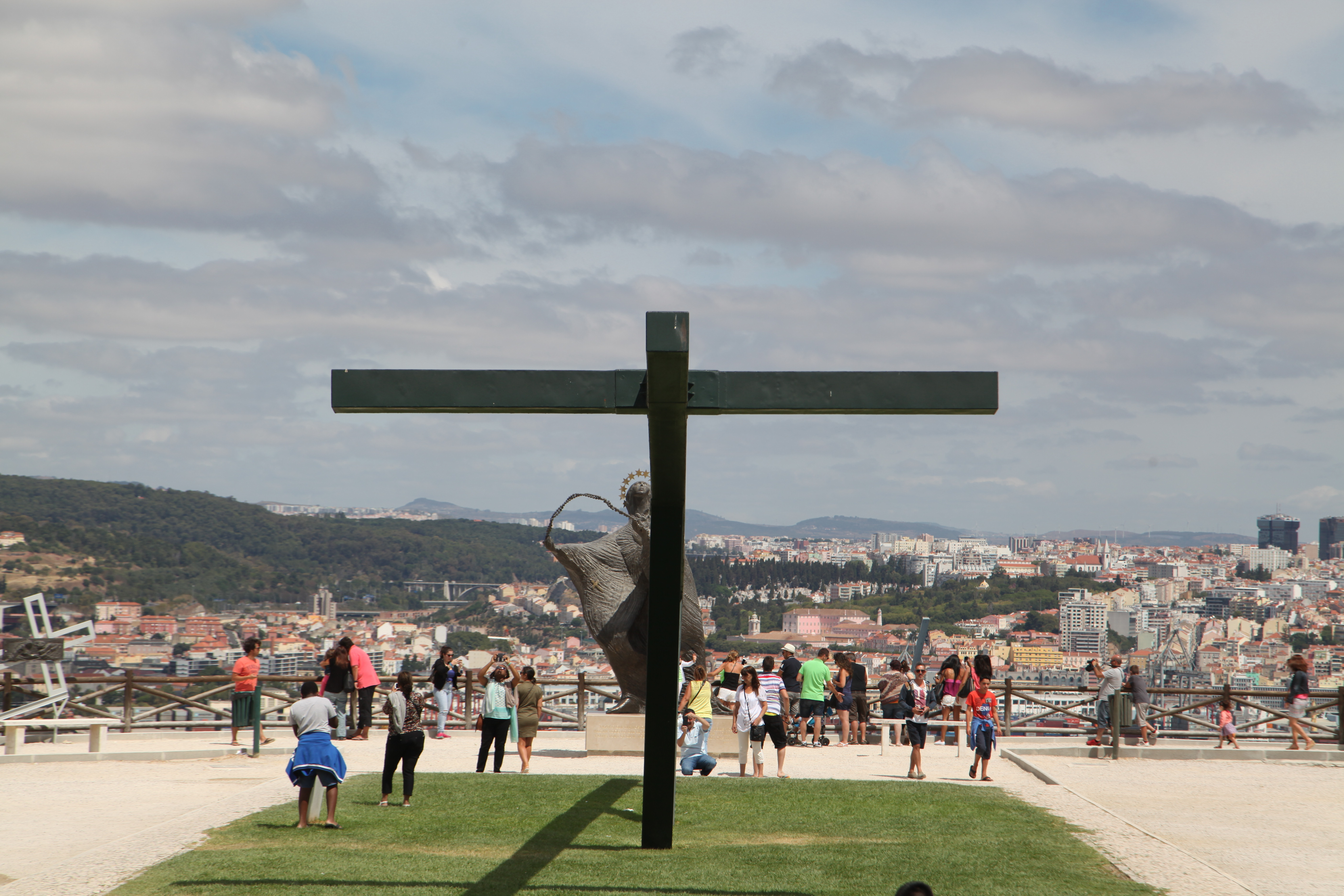 Lisbonne